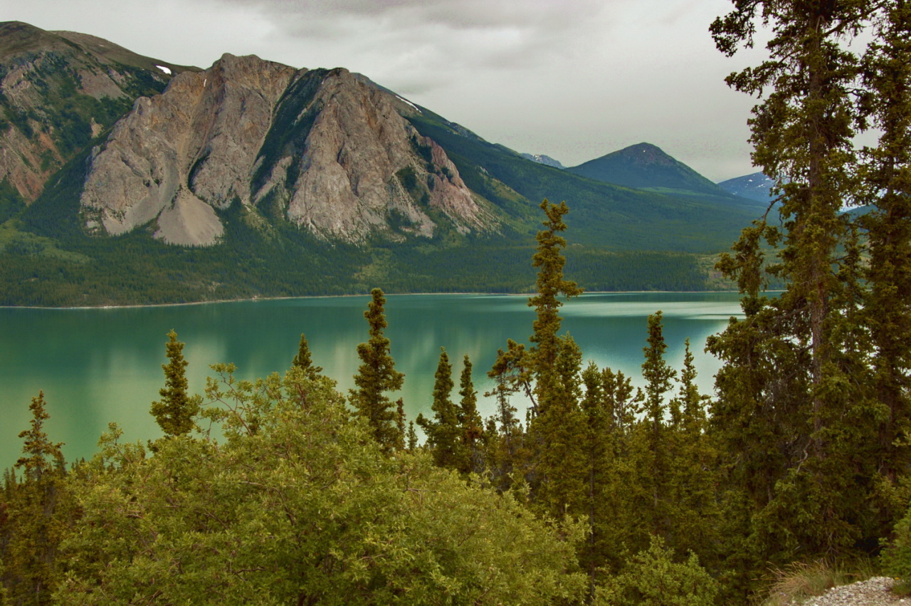 Yukon River